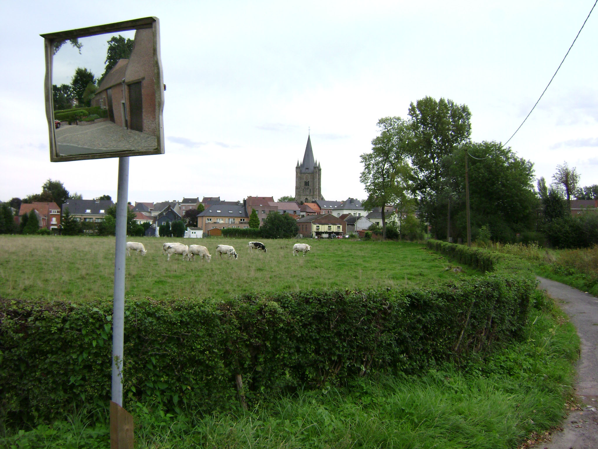 zicht op centrum Herne